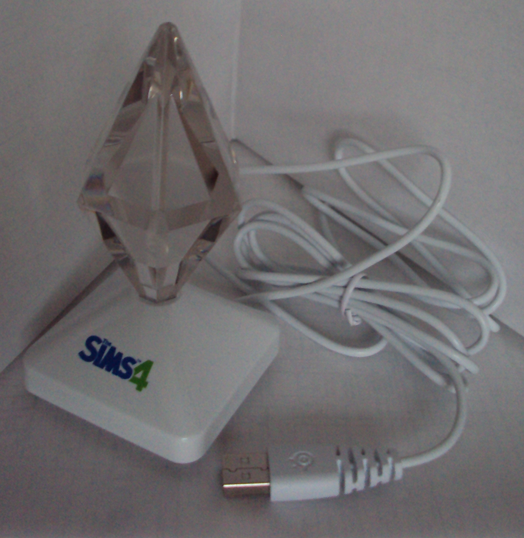 USB-plumbob van De Sims 4 geeft geen licht